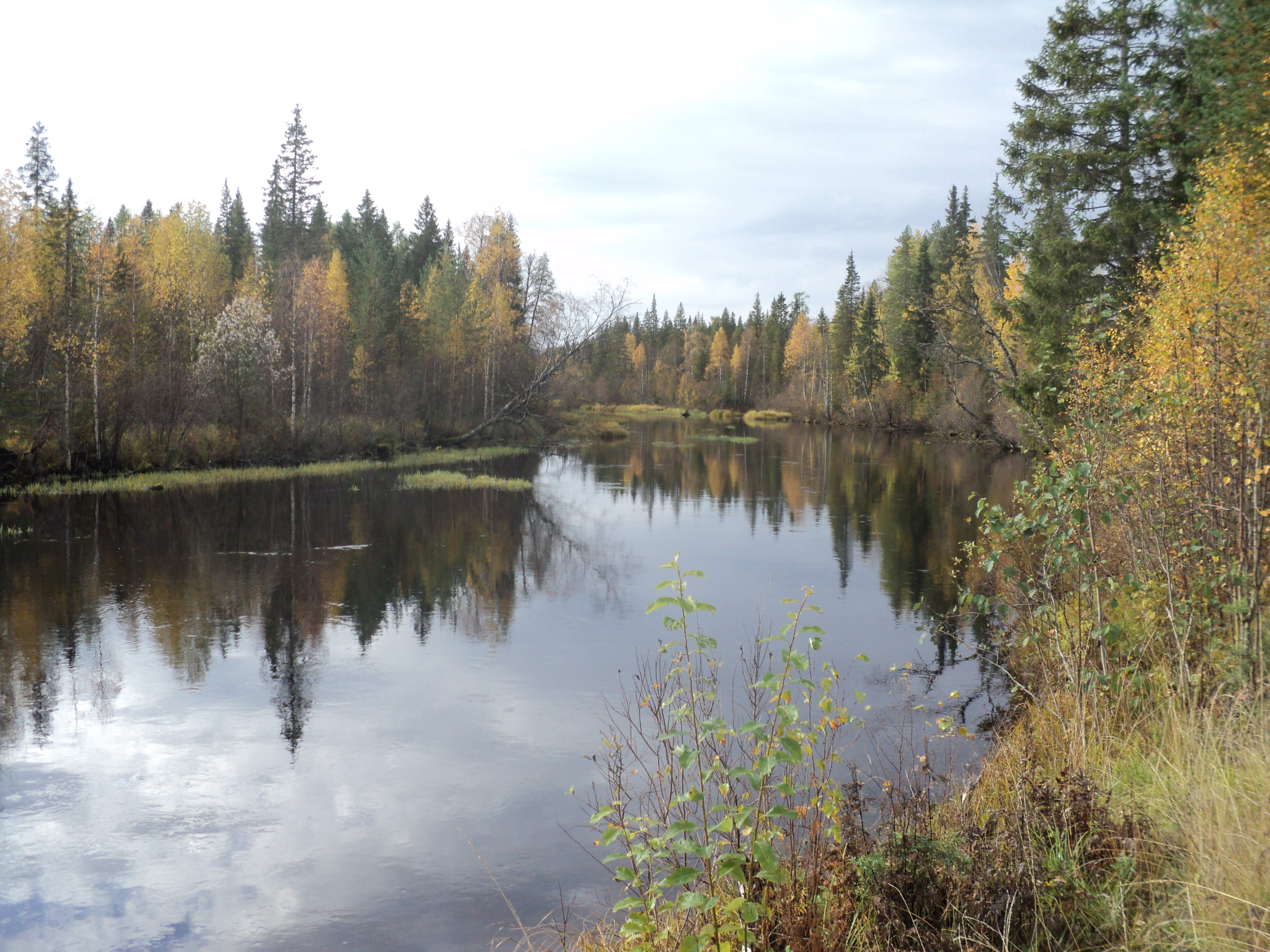 Ваймуга